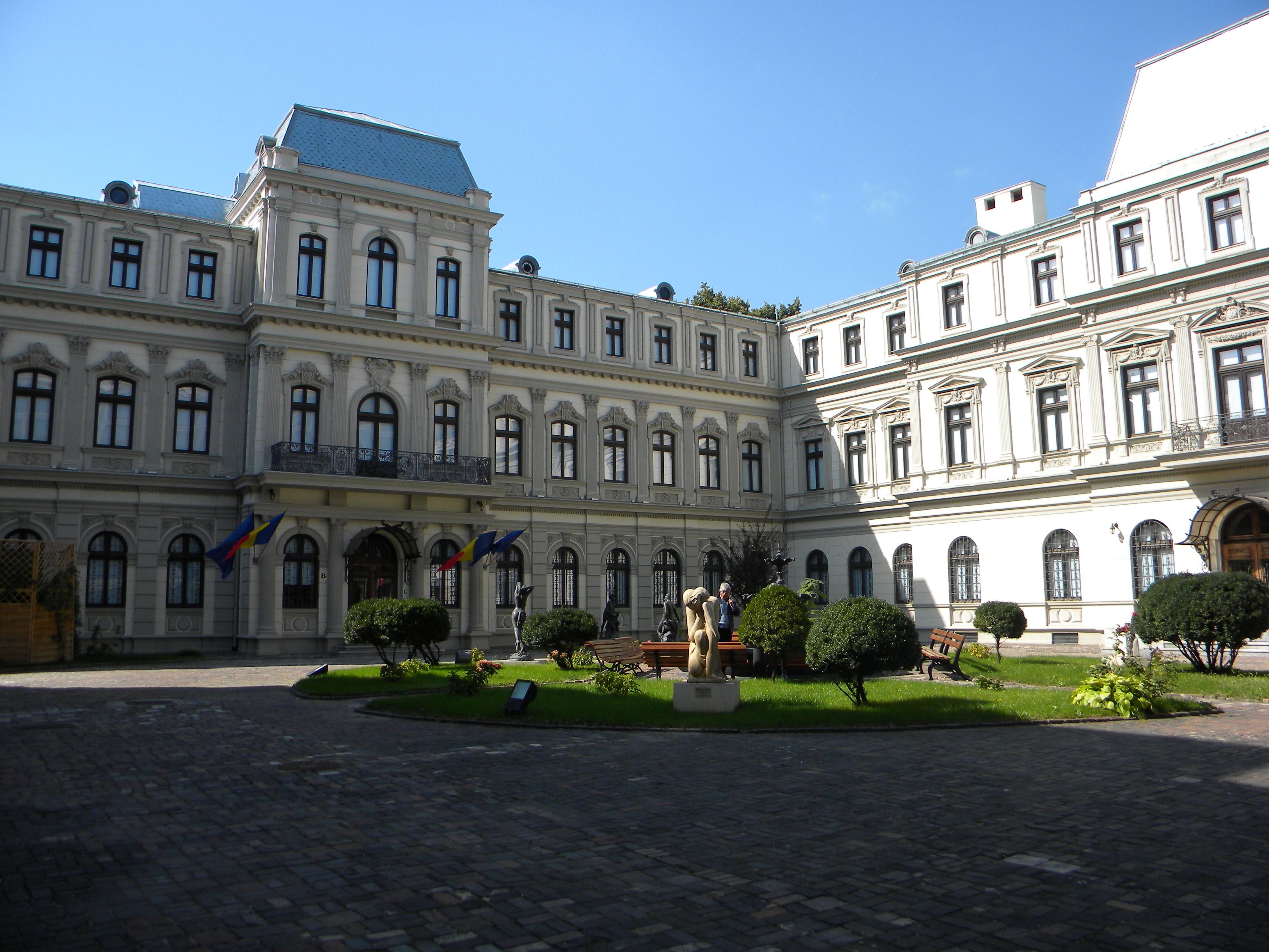 București, România, Muzeul Colecțiilor, Calea Victoriei nr. 111-113, sector 1